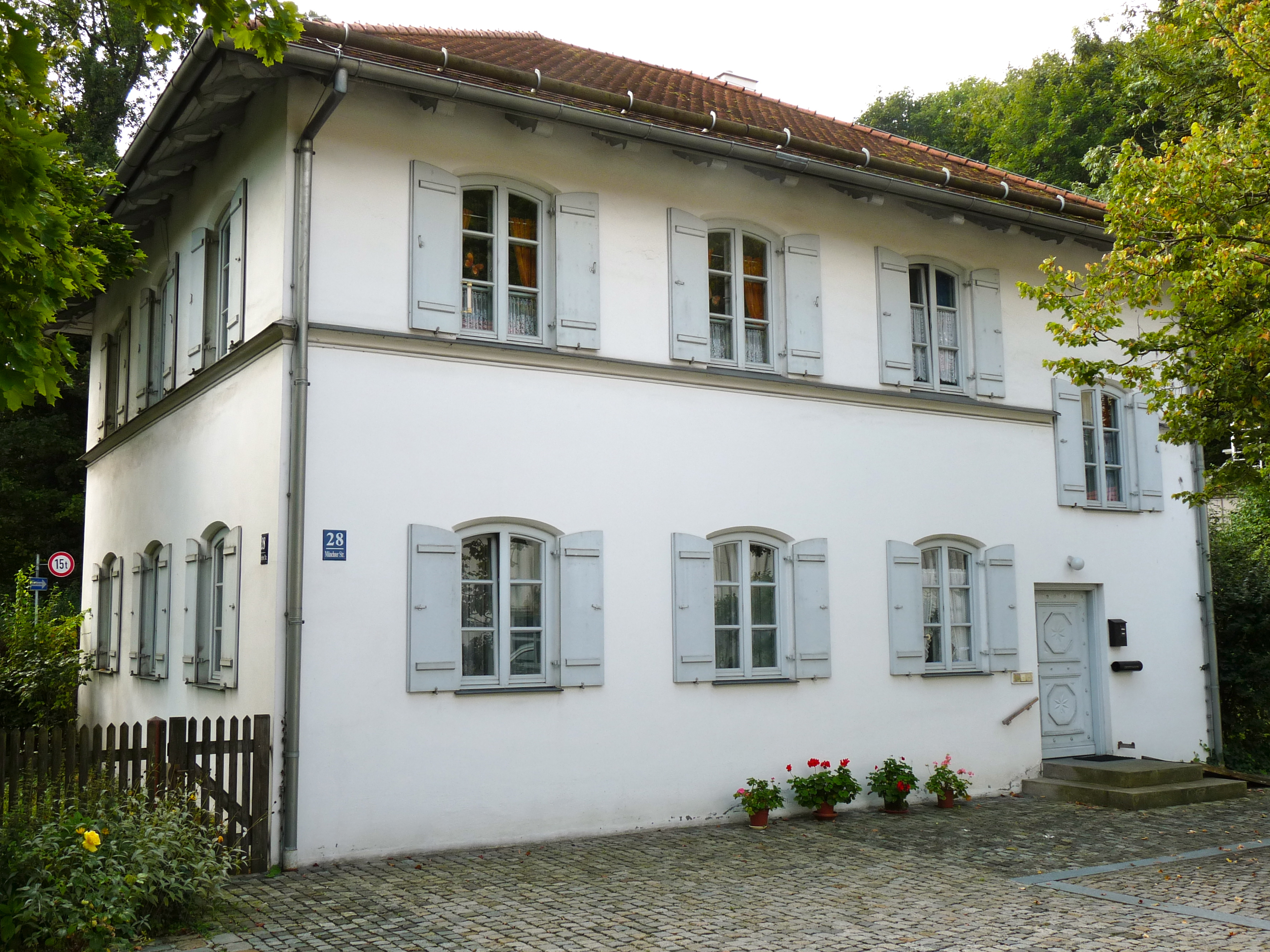 Ansicht der Münchner Straße 28 in München (Ehem. Schule, von 1902-27 Pfarrhaus, erbaut 1845-46.)This is a photograph of an architectural monument.